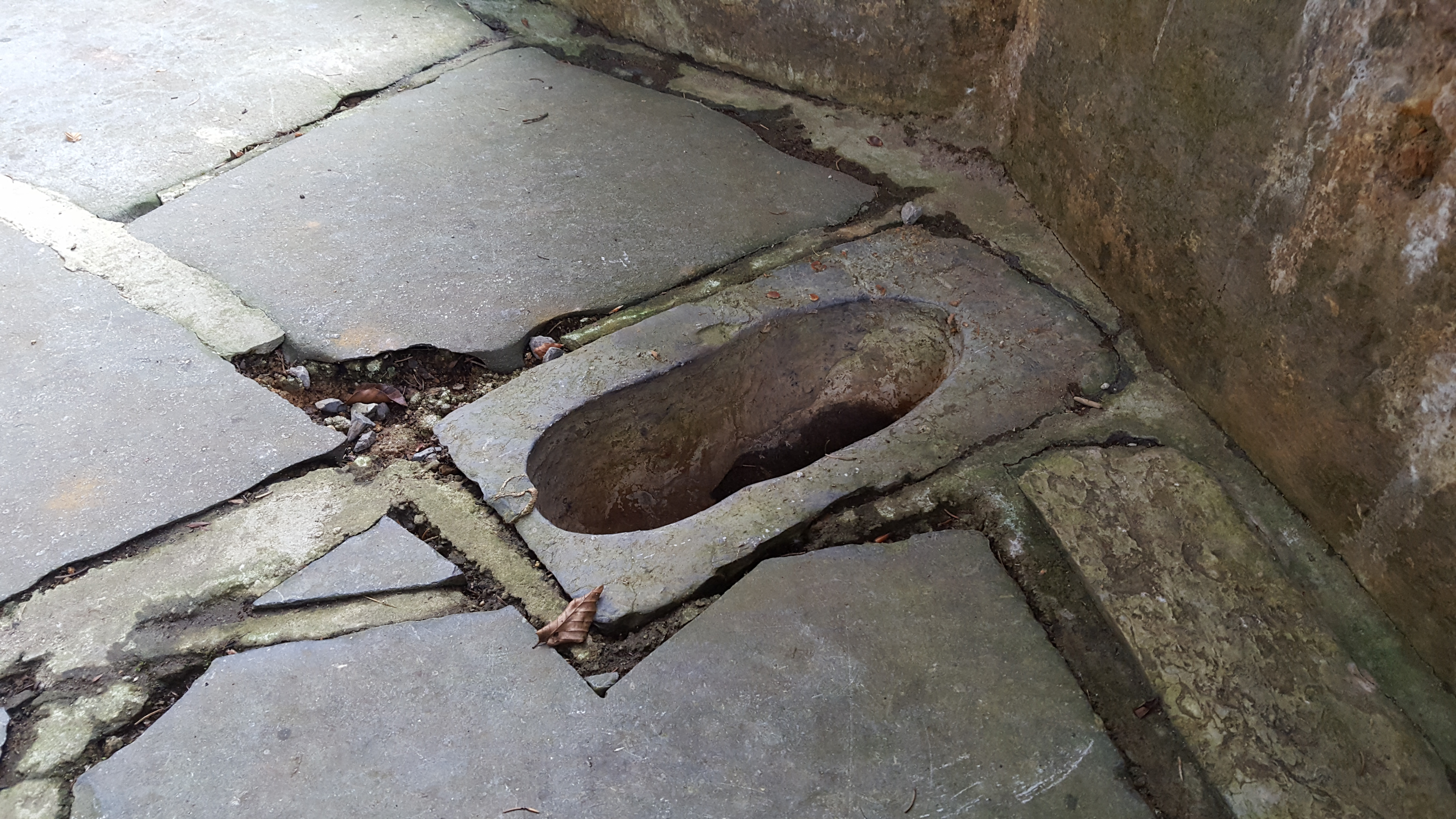 Source de la Sauvenière et Source de Groesbeek, Spa, Belgique